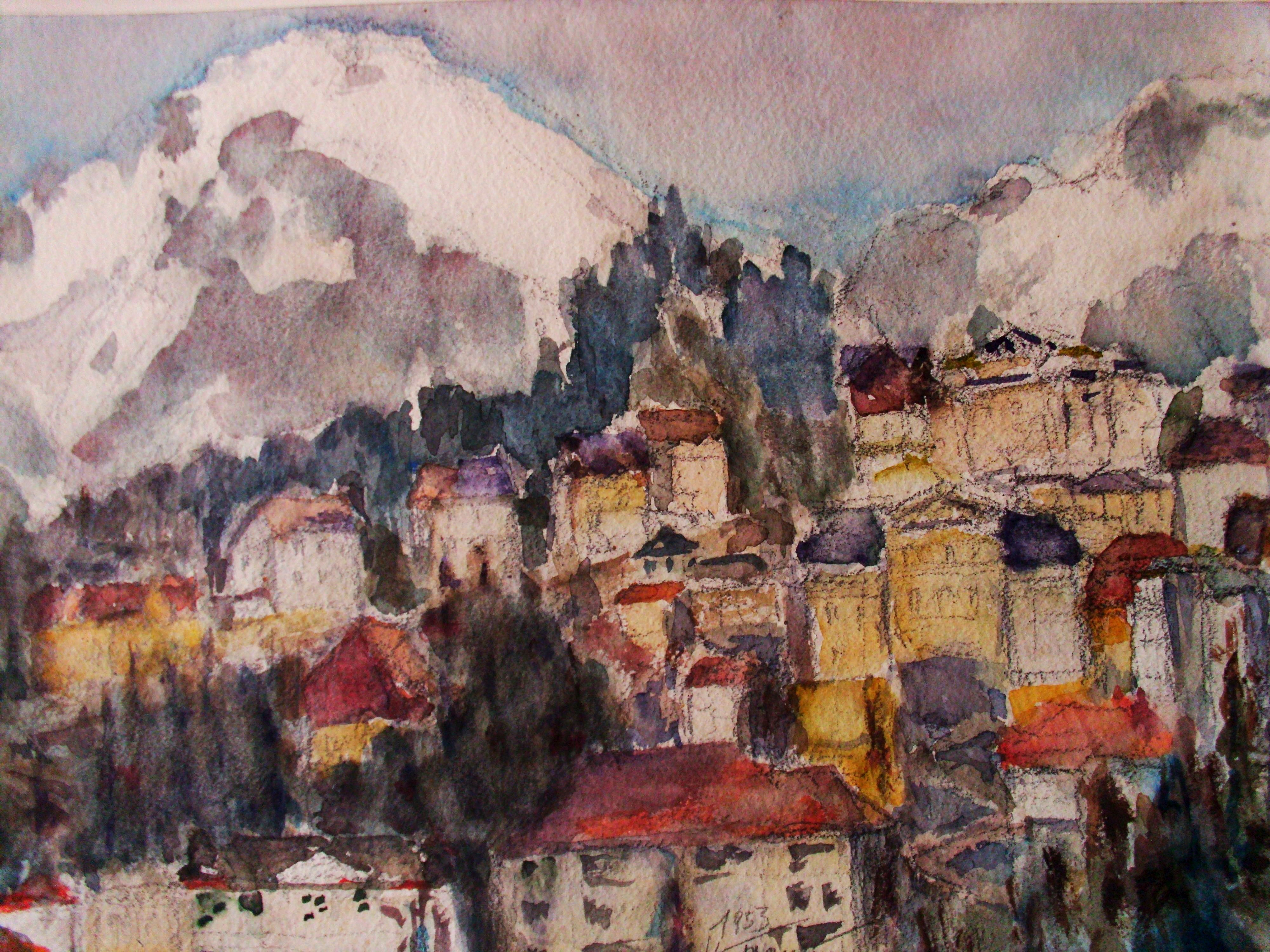 Aquarell von Bad Gastein und dem Berg Feuersang.